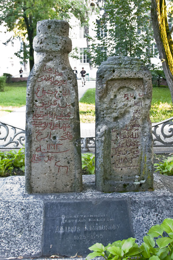 Памятник деятелю Кабарды XVII-XVIII вв Казаноко Жабаги